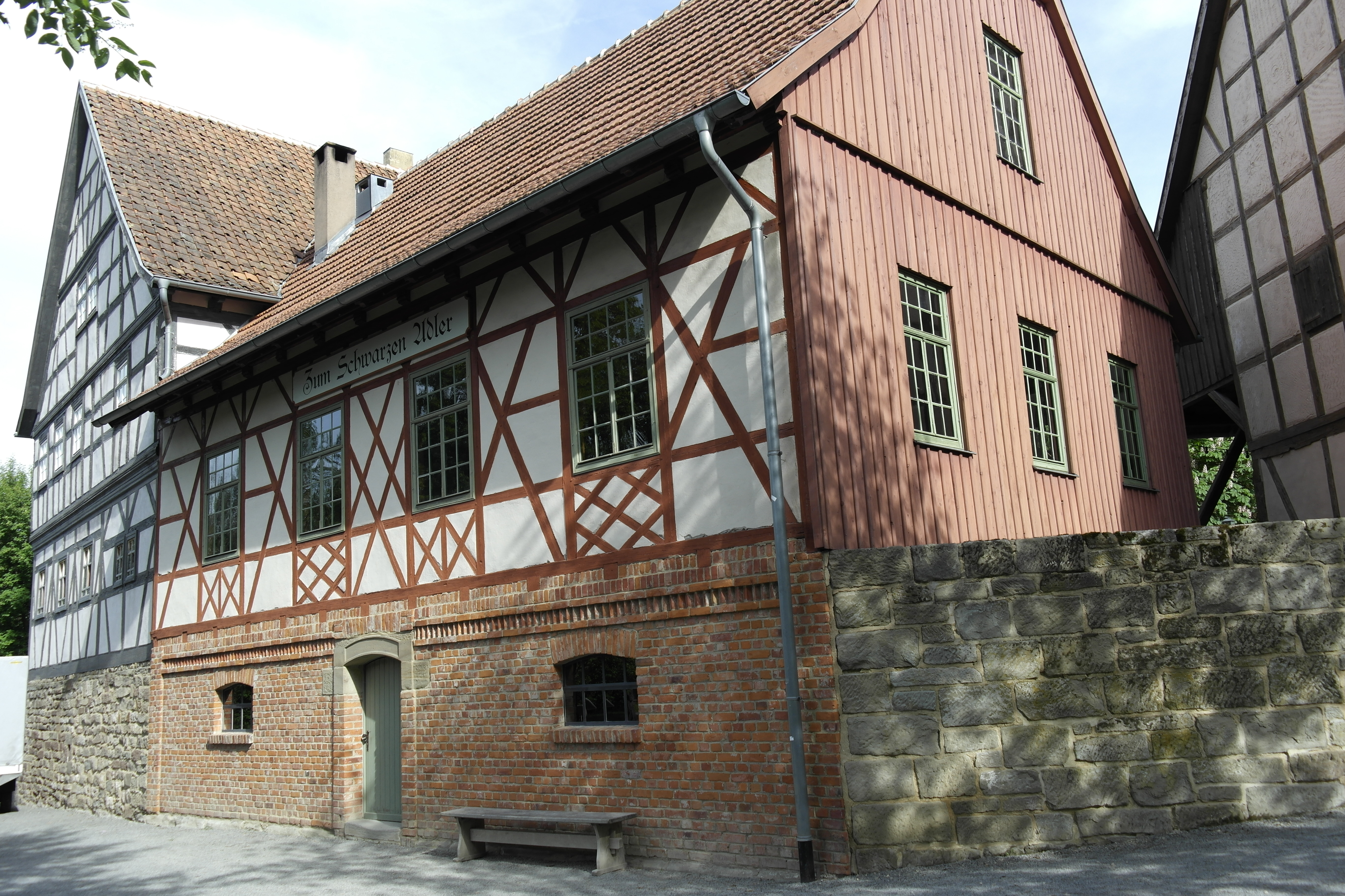 Fränkisches Freilandmuseum Fladungen, Wirtshaus Schwarzer Adler, RückseiteThis is a photograph of an architectural monument.